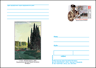 Марка. 1903-1987. Нiскi Георгiй Рыгоравiч. Народны мастак РСФСР. Иллюстрация. Г. Нiскi. Зялёная дарога. 1959. Нацыянальны мастацкi музей Рэспублiкi Беларусь.